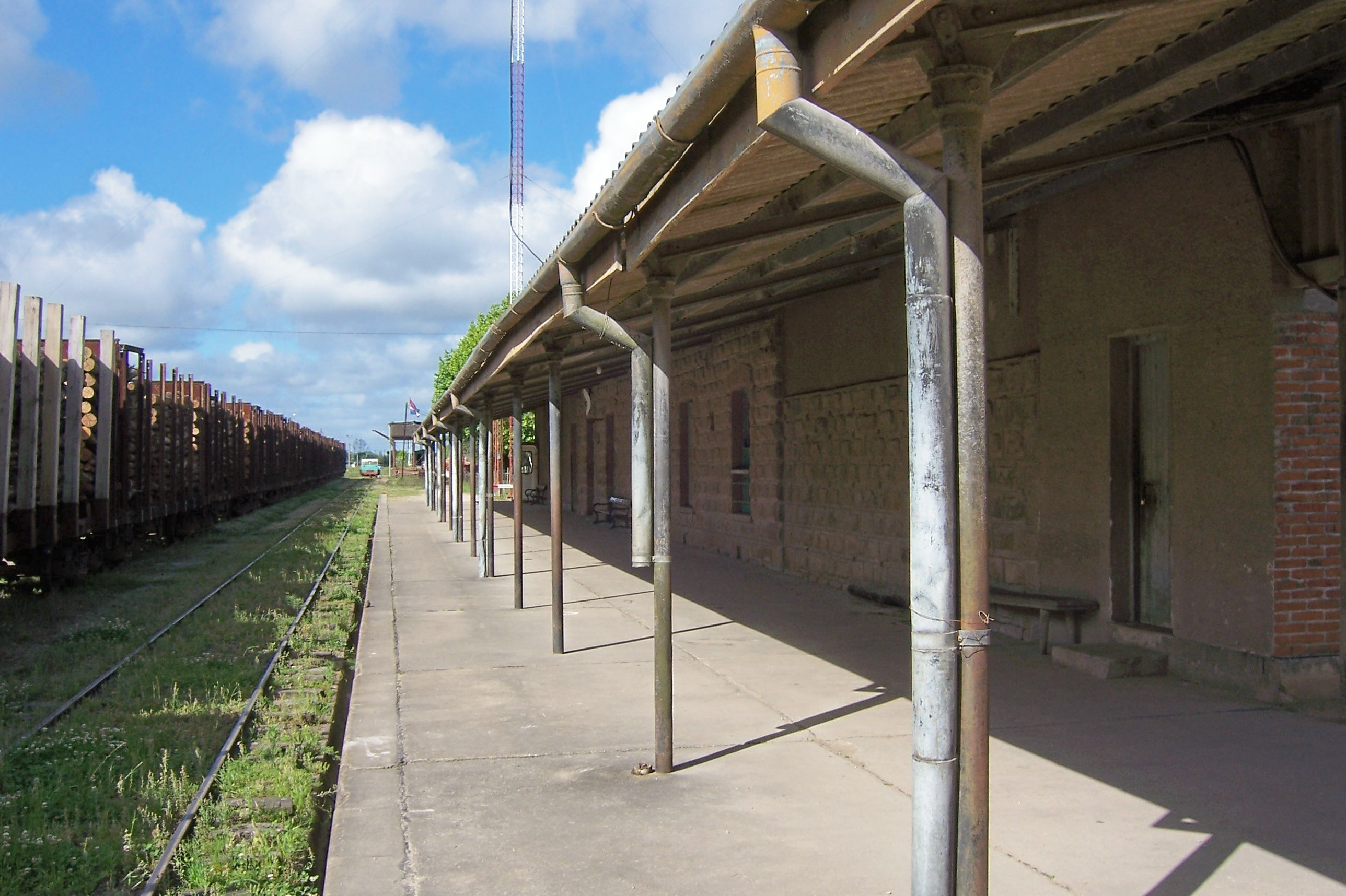 Estación ferroviaria en la ciudad de Tacuarembó, Uruguay.